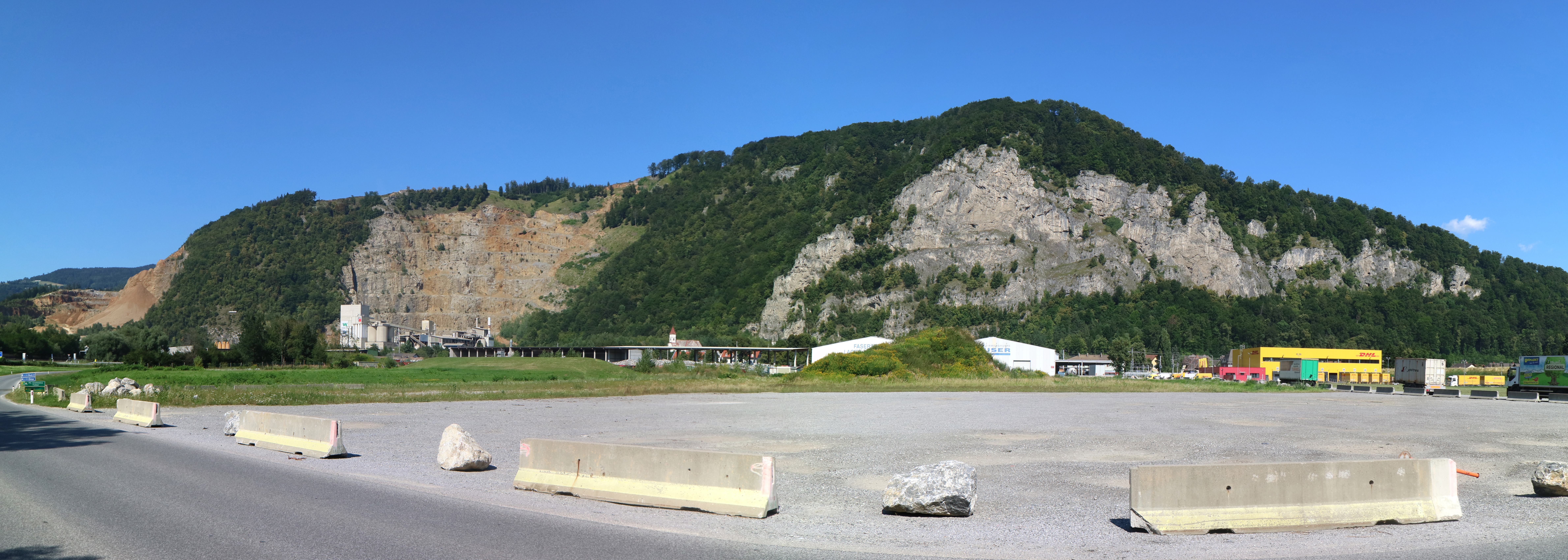 Tanneben mit Kalksteinbruch W&P und Peggauer Wand von Westen, Gemeinde Peggau, Steiermark